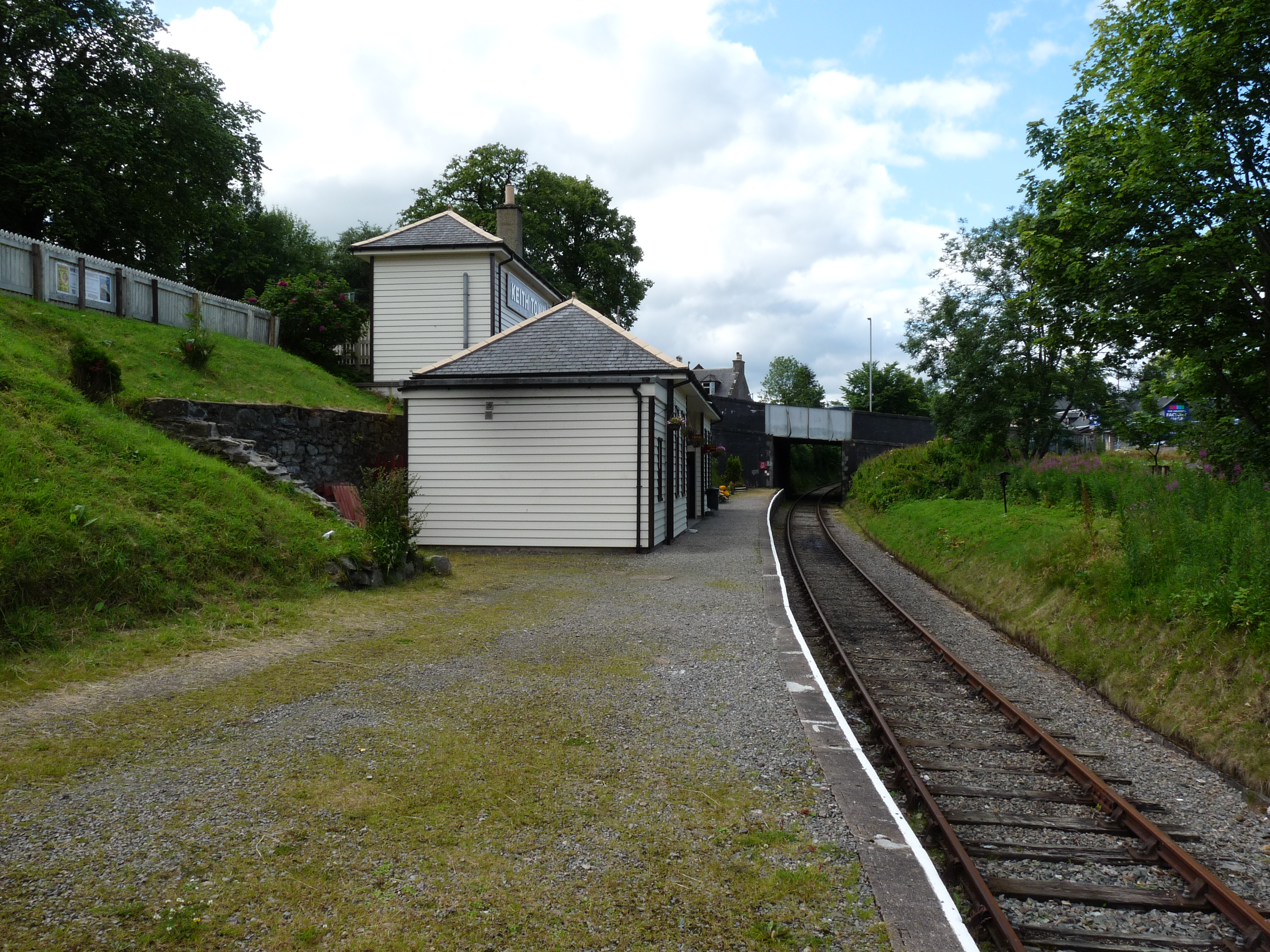 Het station Keith Town van de museumspoorlijn Keith and Dufftown Railway.